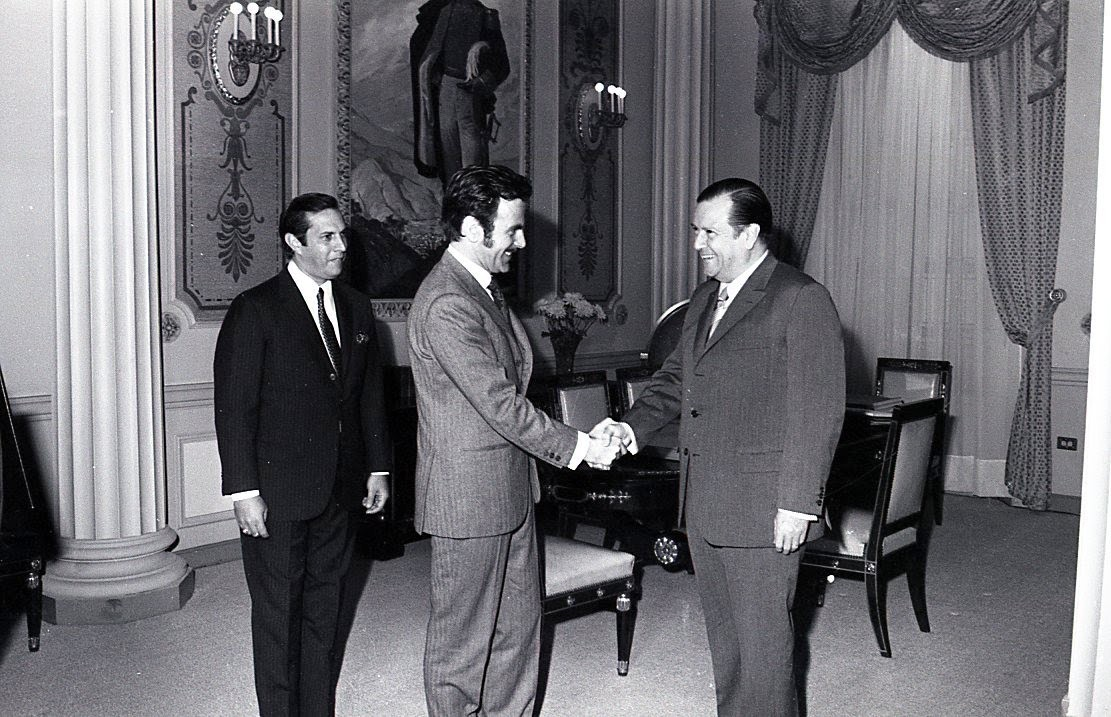 Visita del autor austriaco Maximilian Schell al Palacio presidencial de Miraflores en Caracas. Allí, junto al equipo de la película sobre Simón Bolívar, que él protagonizó, se reunieron con el presidente Rafael Caldera en su despacho.